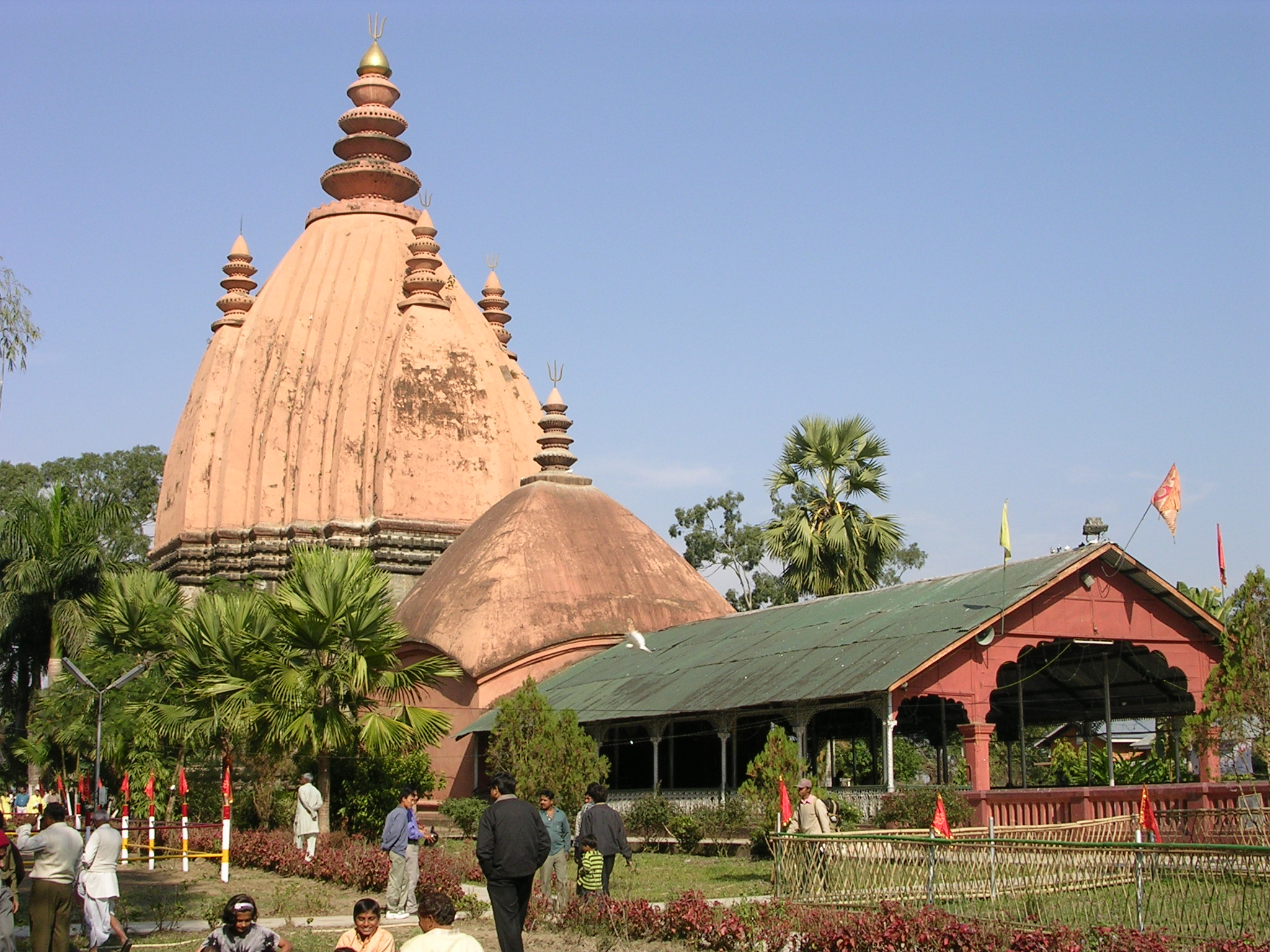 অসমীয়া: শিৱসাগৰৰ শিৱদ’ল